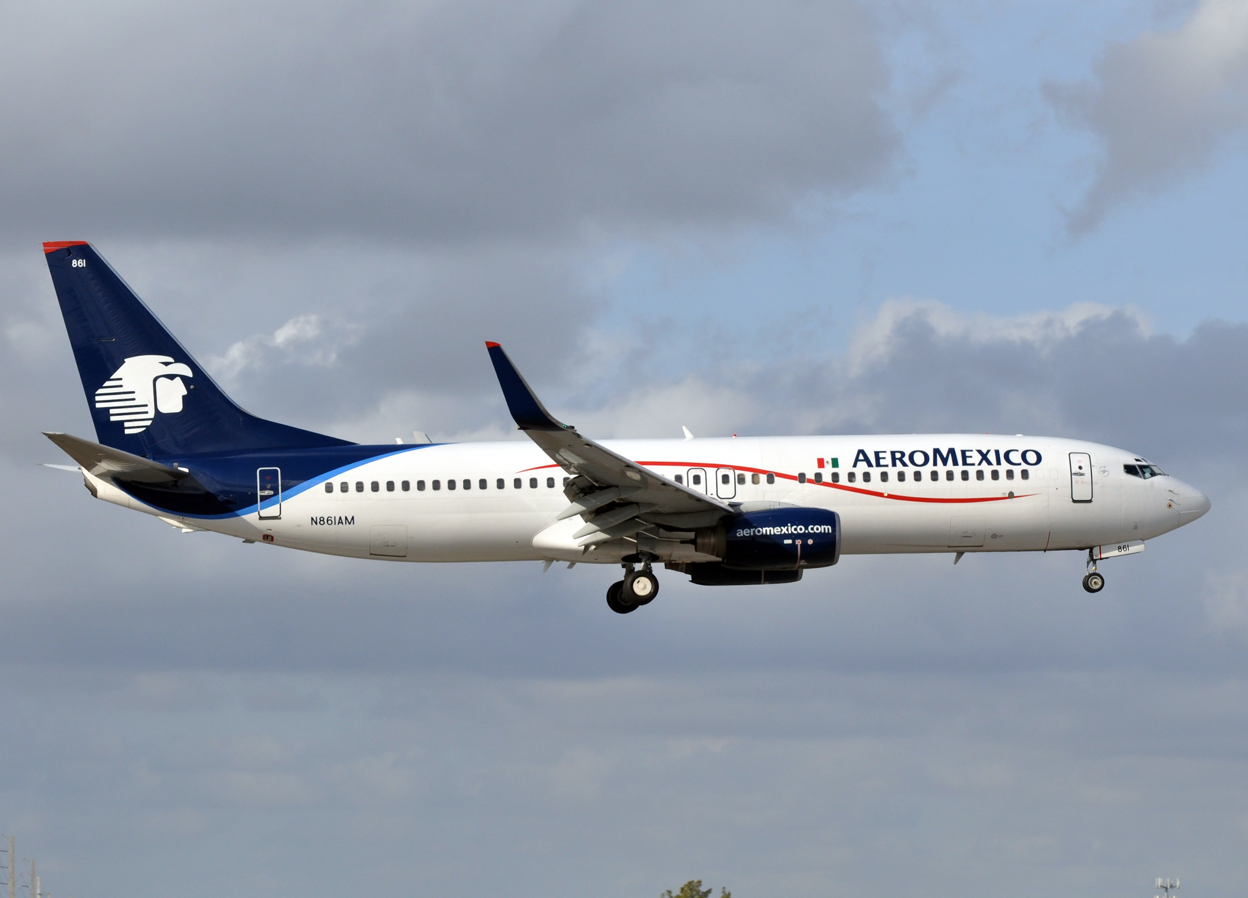 MSN 30706 B737-83N AEROMEXICO MIA EX ATA, SAGA AIRLINES, AIR ALGERIE